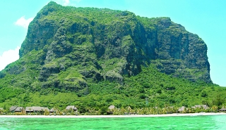 Le Morne Brabant